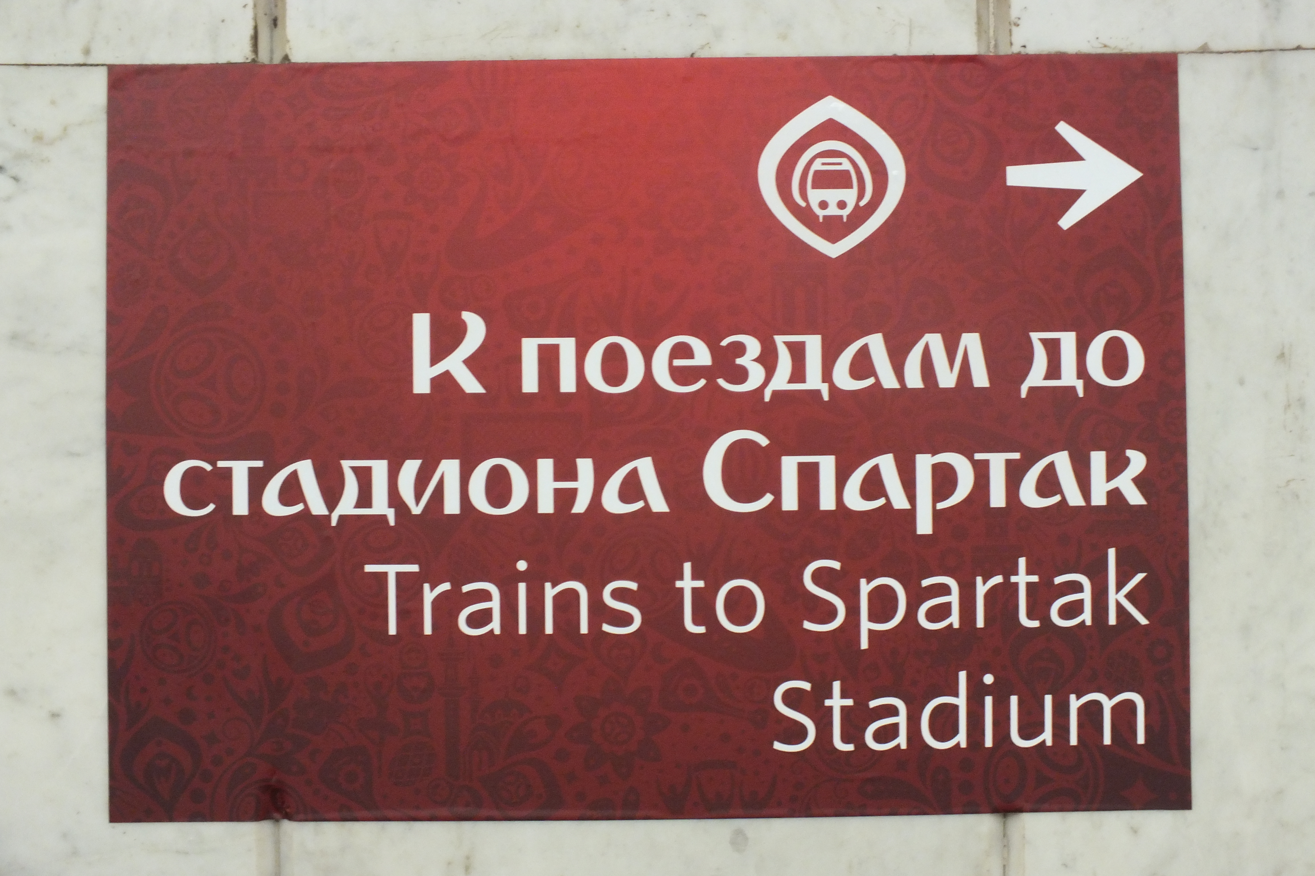 Указатель "К поездам до стадиона Спартак". Подобные указатели были специально сделаны для Кубка конфедераций 2017. Фотография сделана на станции Крестьянская Застава.